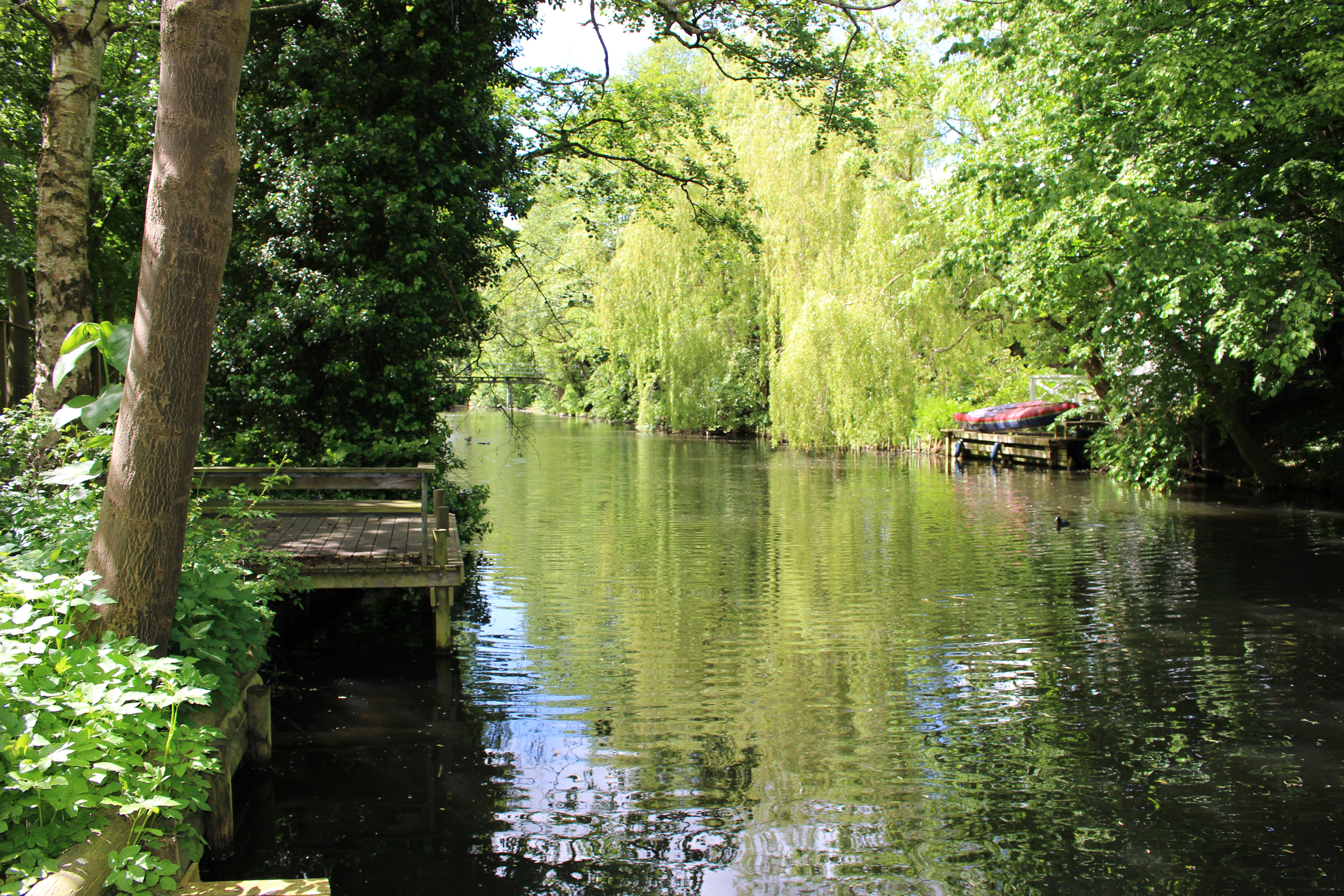 Fæstningskanalen, Kongens Lyngby.